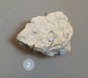 Fossil of Cooksonia, an extinct plant Took the photo at Musee d'Histoire Naturelle, Brussels